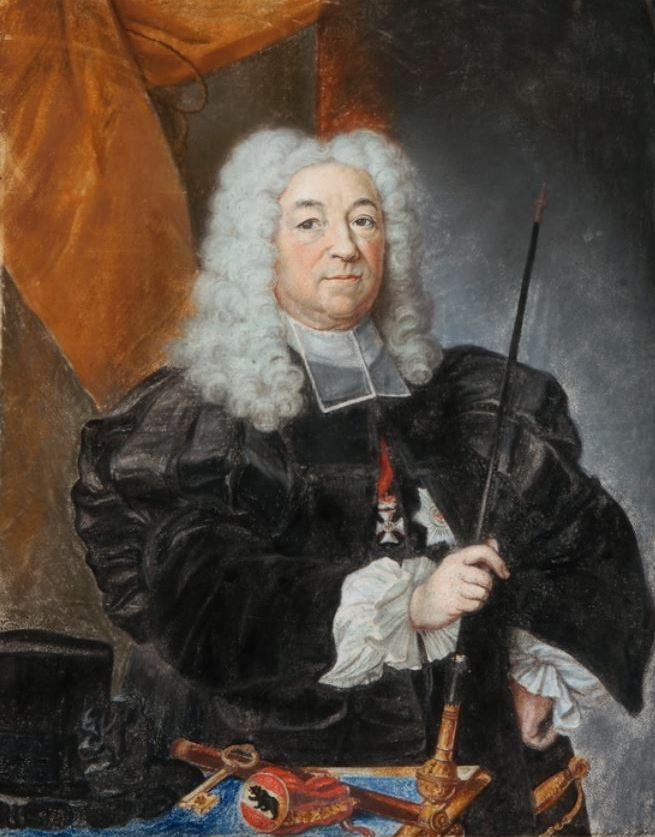 Bildnis Hieronymus von Erlach (1667-1748), nach dem 1730 entstandenen Bildnis von Carlo Francesco Rusca.